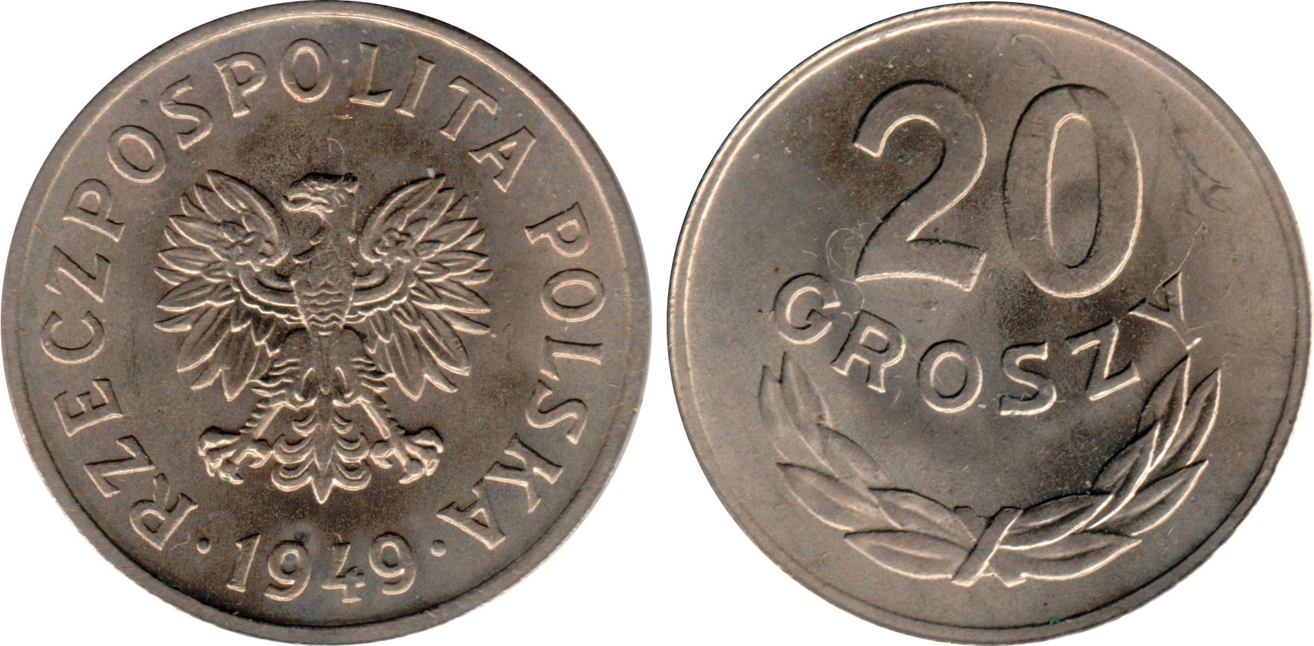 20 groszy 1949 CuNi